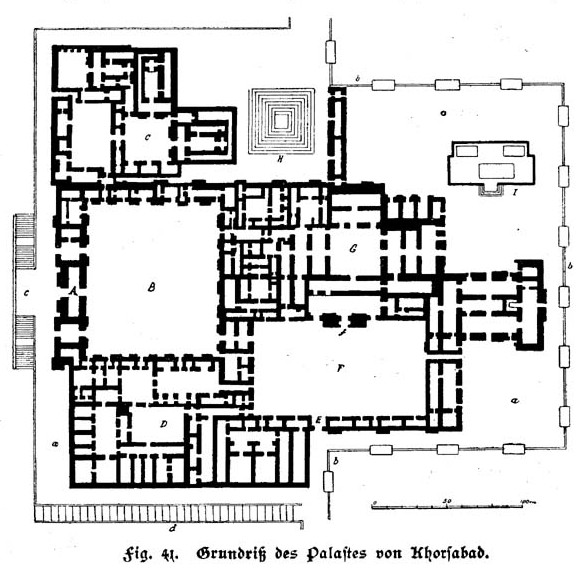 Grundriss des Palastes von Khorsabad - Ausgrabung Place